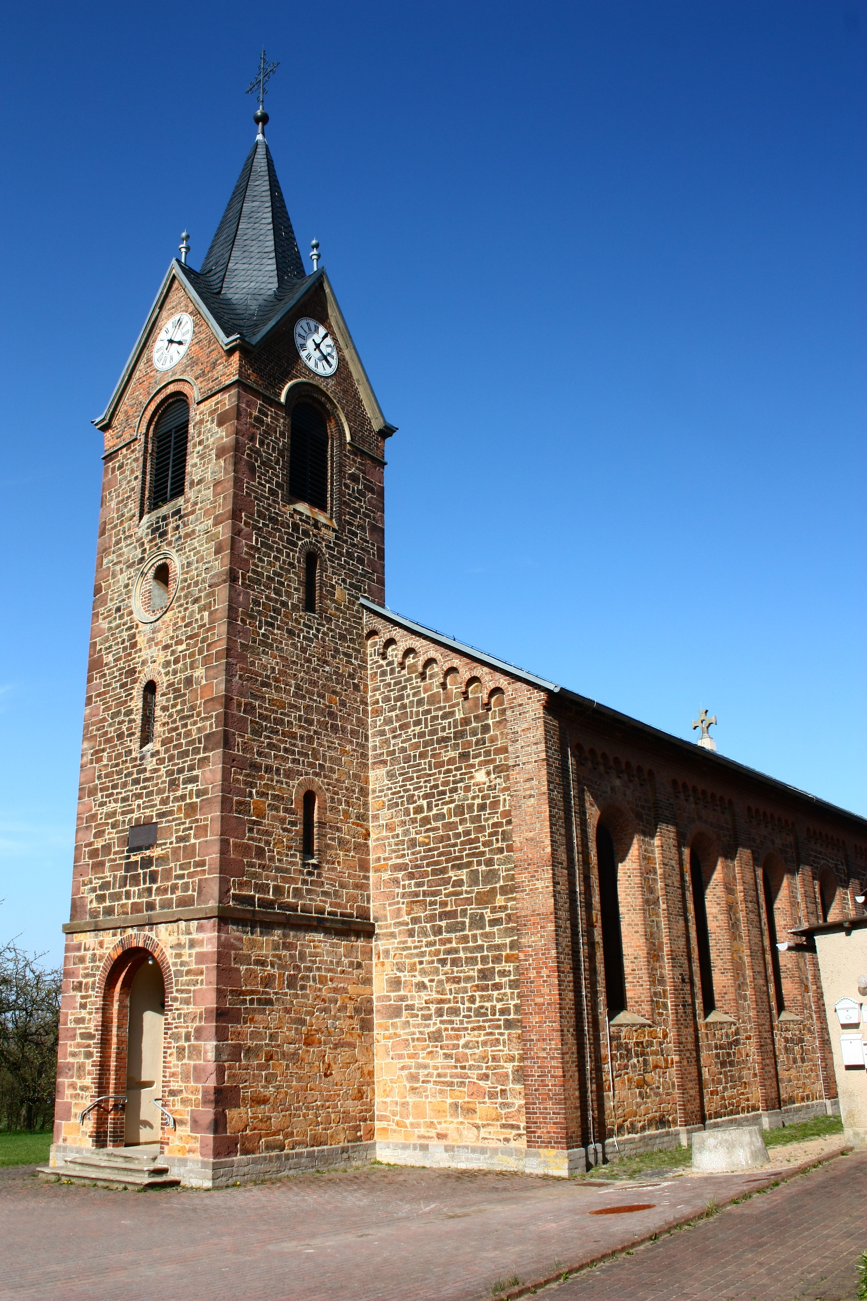 die Dorfkirche von Bräunrode